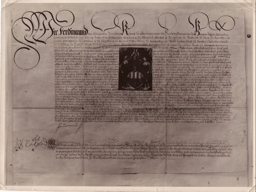 Wappenbrief derer von Preu aus 1538